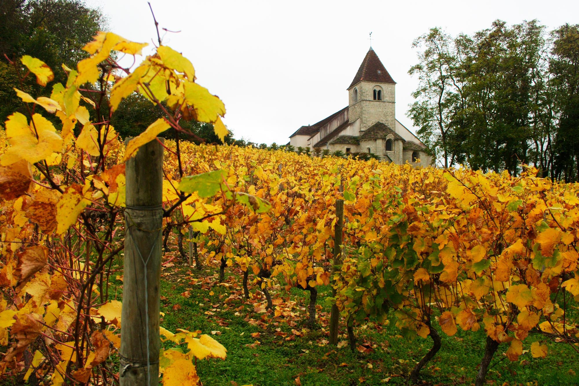 L'église de Vergy dans les vignes